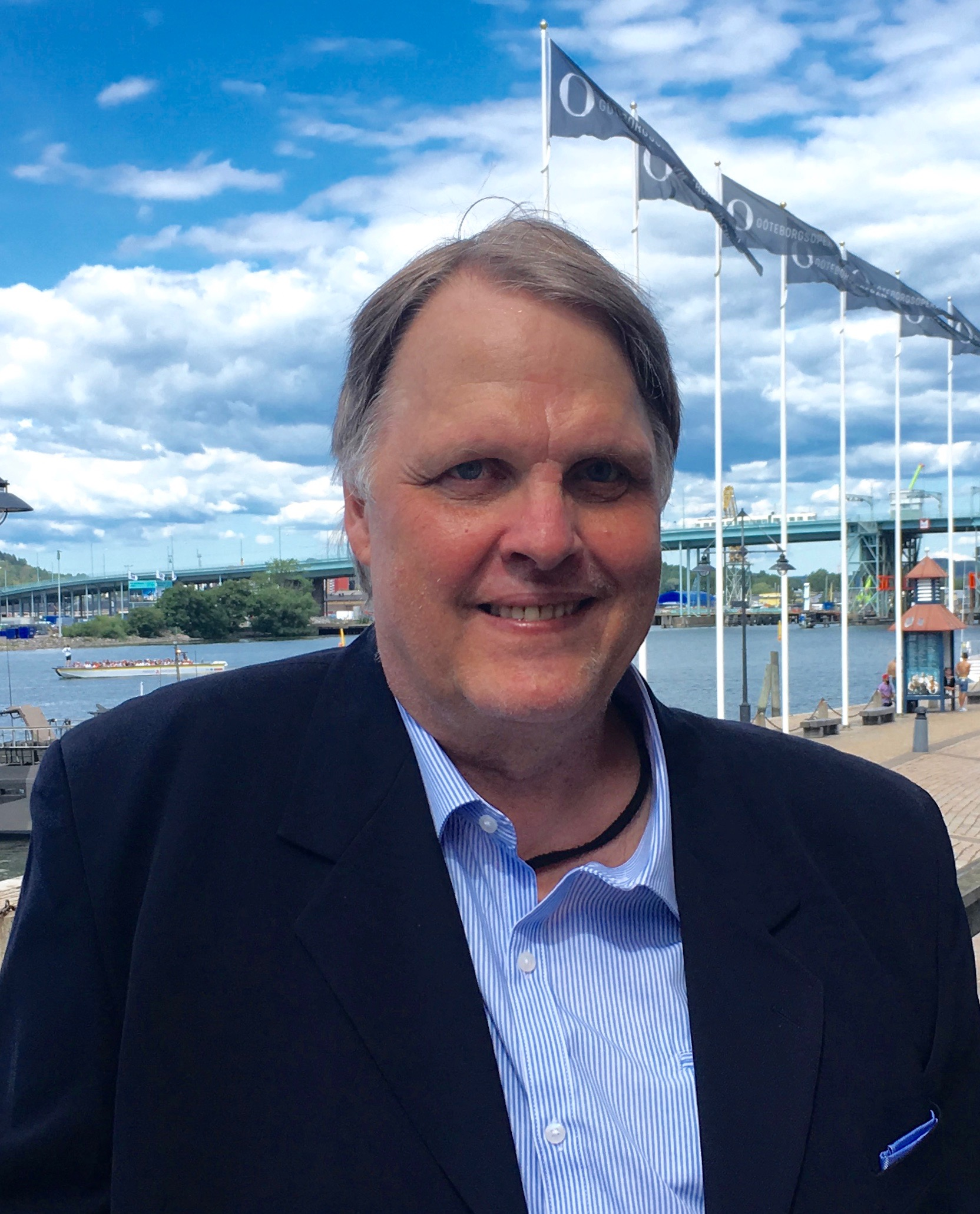 Raymond Björling, operasinger (tenor). In front of GöteborgsOperan, 26th of June 2018.